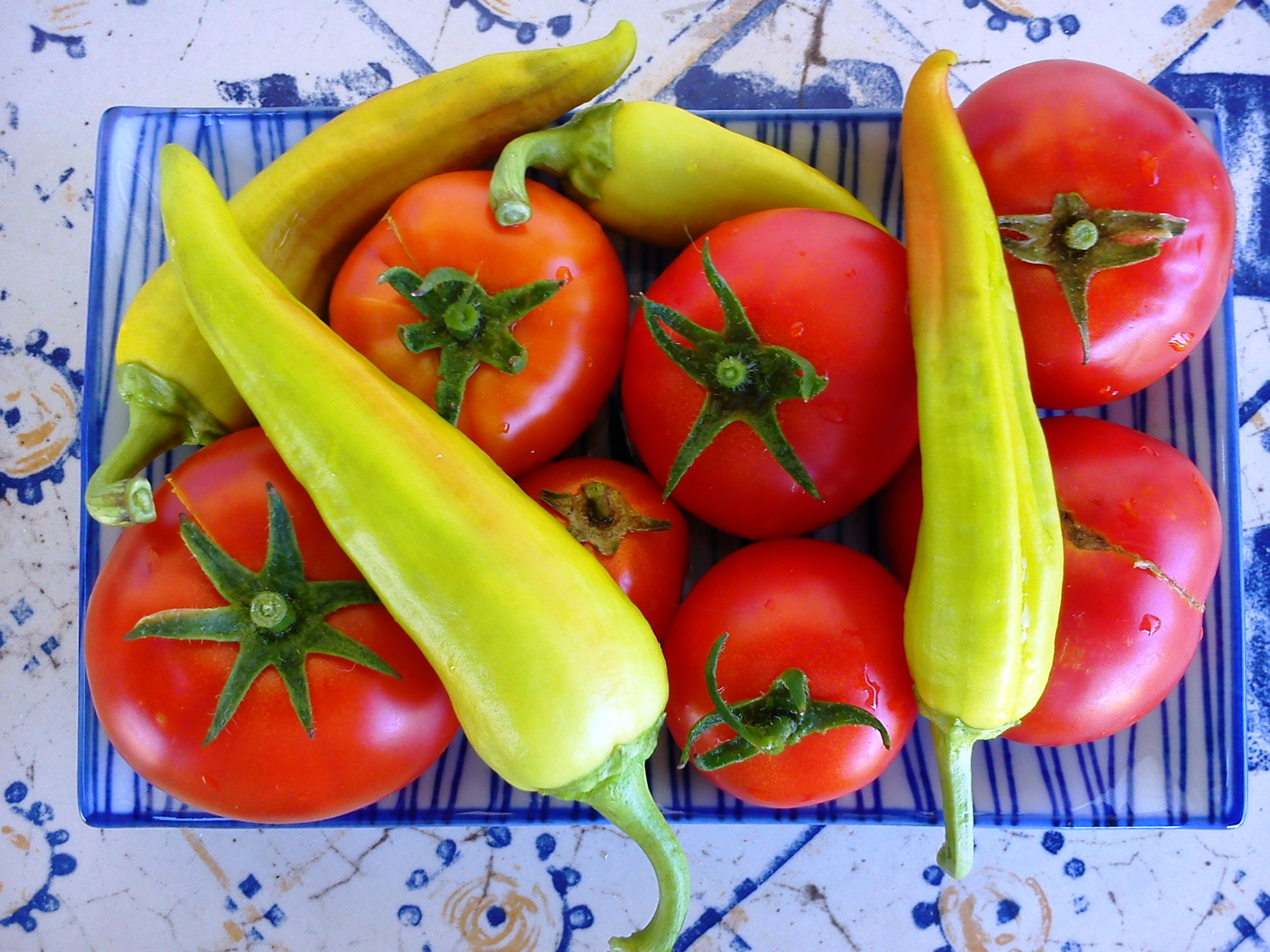 Part of the harvest from cultivation at balcony